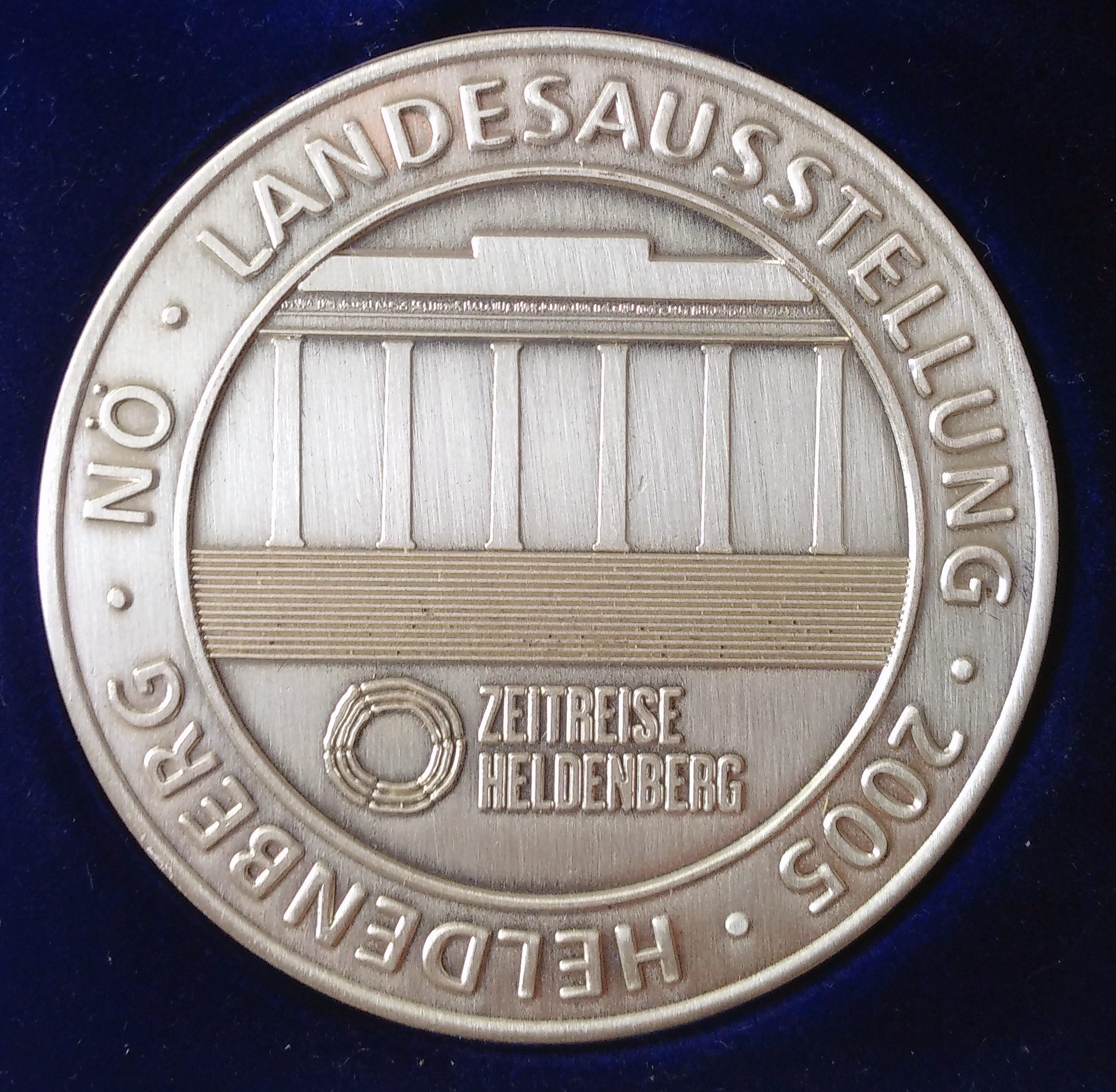 Anerkennungsmedaille des Landes Niederösterreich für Verdienste um die Landesausstellung (2005, Vorderseite)